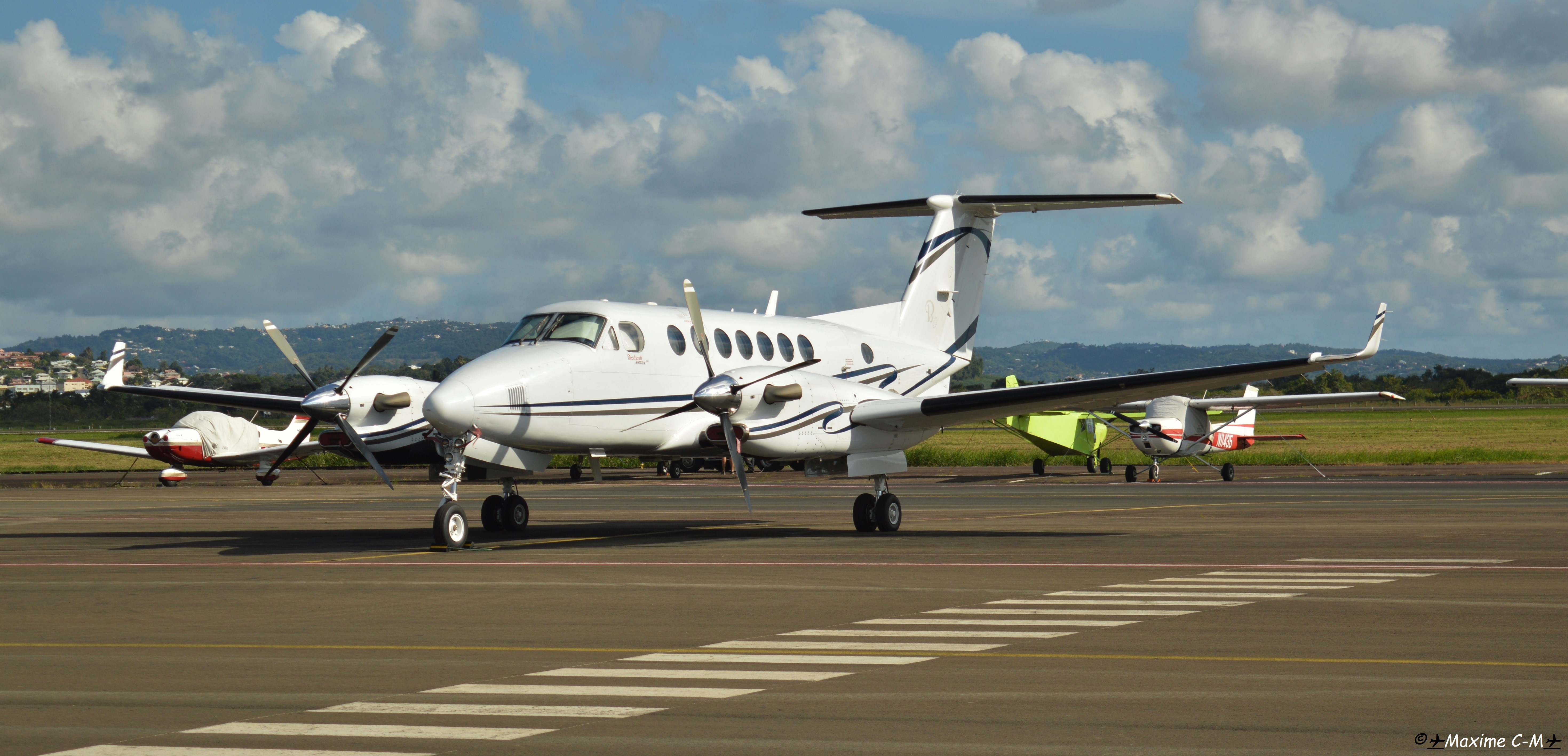 Beechcraft King Air 350 PR-OTG